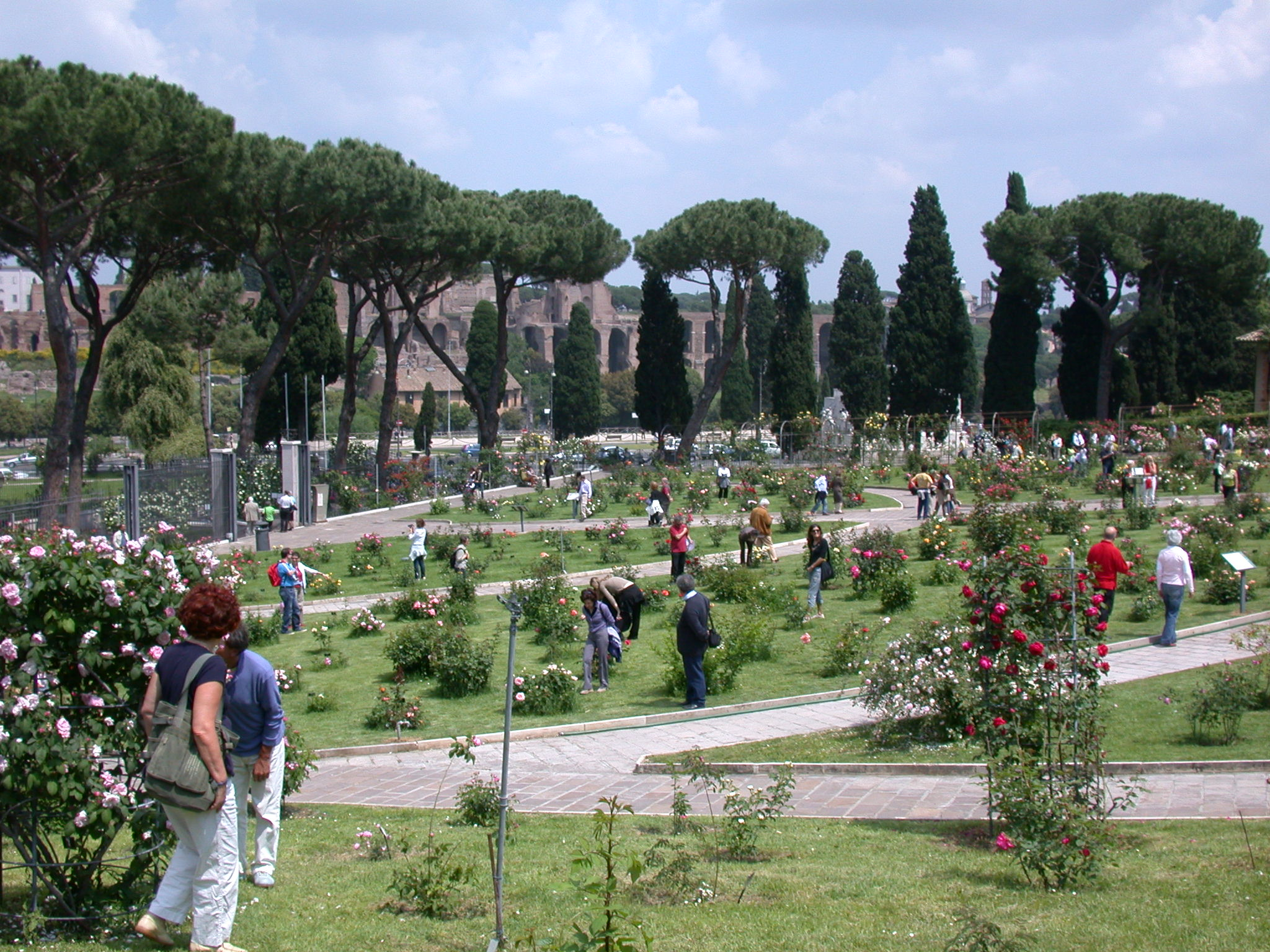 Roma, Roseto comunale (collezione di rose), (pendici dell'Aventino verso il Circo Massimo) vista generale